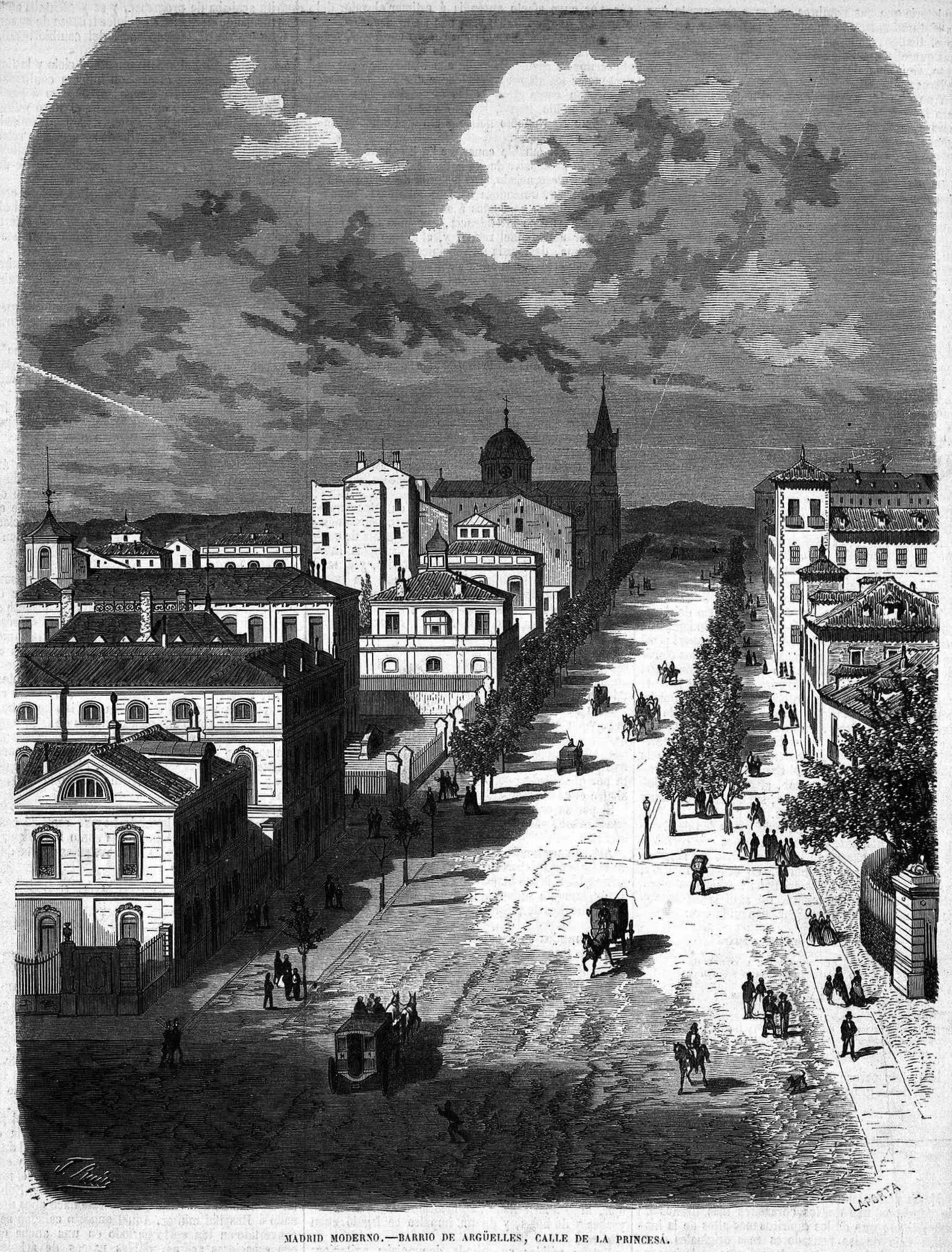 Madrid Moderno, Barrio de Argüelles, Calle de la Princesa, en el El Museo Universal.